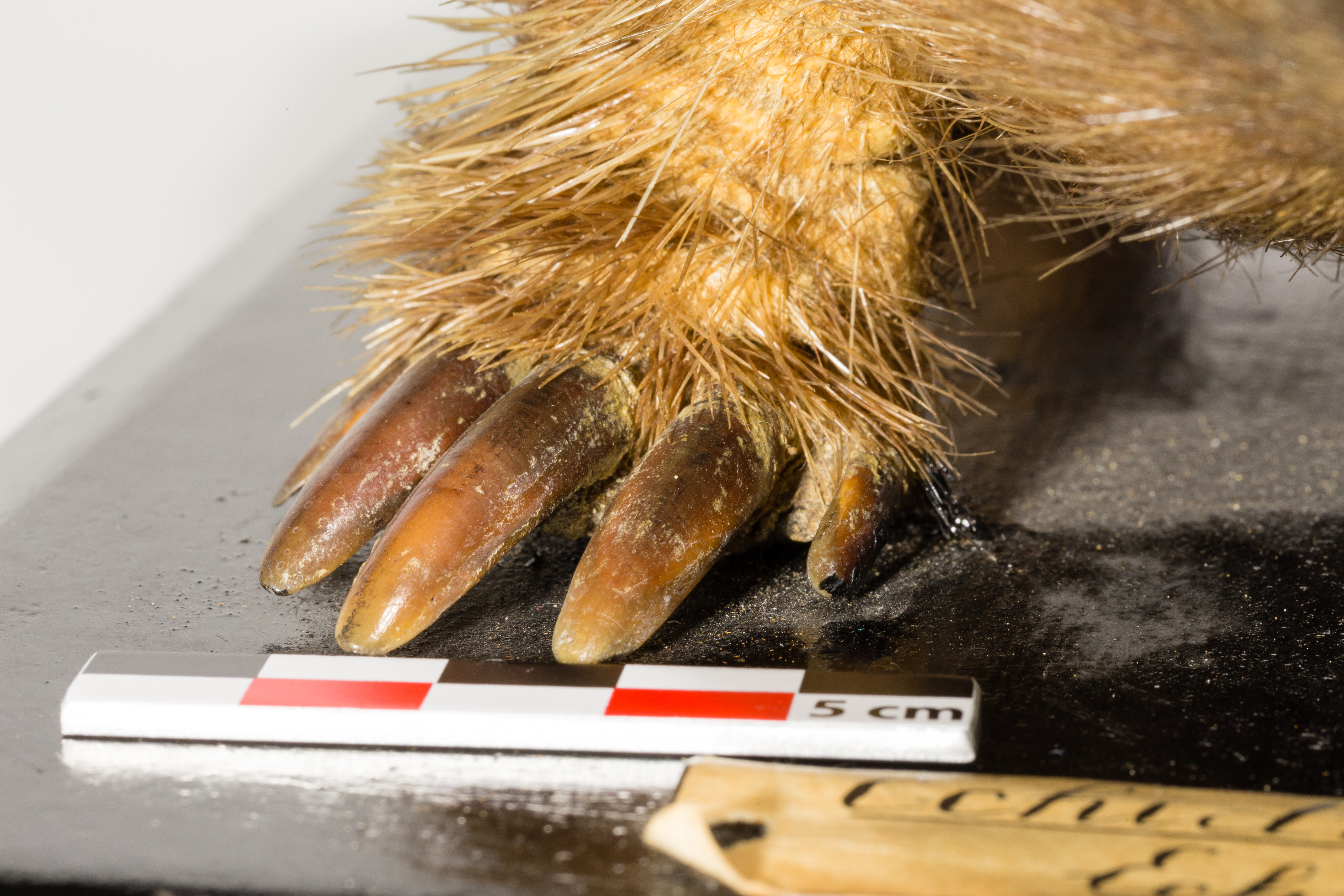 Échidné à nez court, naturalisation, entier sur socle.